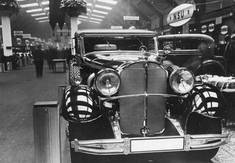 This description has been identified as biased or incorrect: probably a convertible (Cabriolet), not a sedan / saloon (Limousine); official currency in 1931 was ReichsmarkDie Eröffnung der grossen Automobilausstellung in den Ausstellungshallen am Kaiserdamm in Berlin! Der teuerste Luxuswagen Deutschlands, eine Mercedes-Benz-Limousine, welche 46.000,-- Mark kostet.